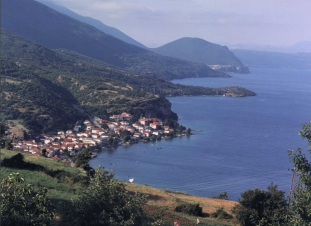 Peštani,Makedonija